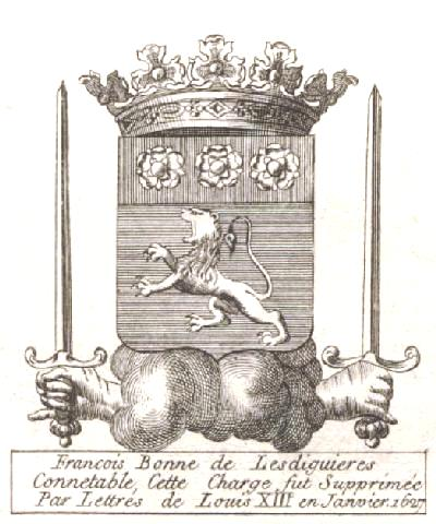 François de Bonne de Lesdiguières de gueules au lion d’or au chef d’azur surmonté de trois roses d’argent. A noter toutefois, l'interversion des hachures dans cette gravure.